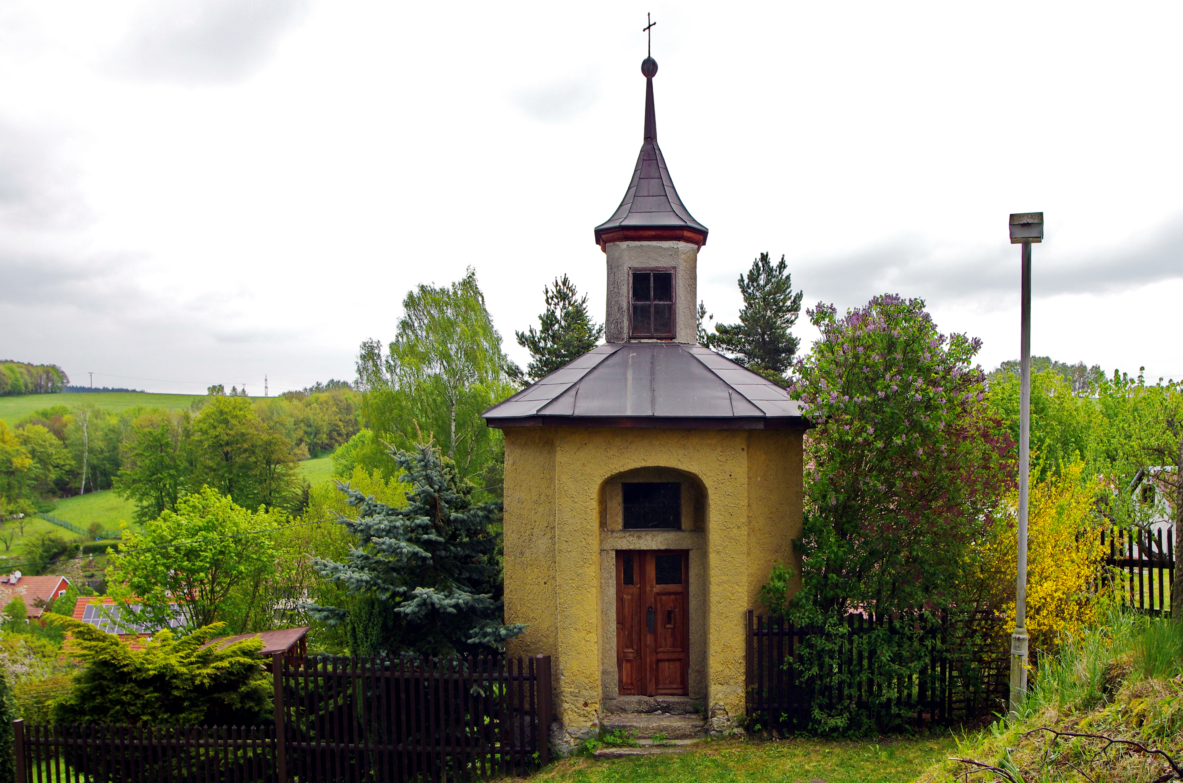 Kaple Božího Těla, Horní Slavkov.